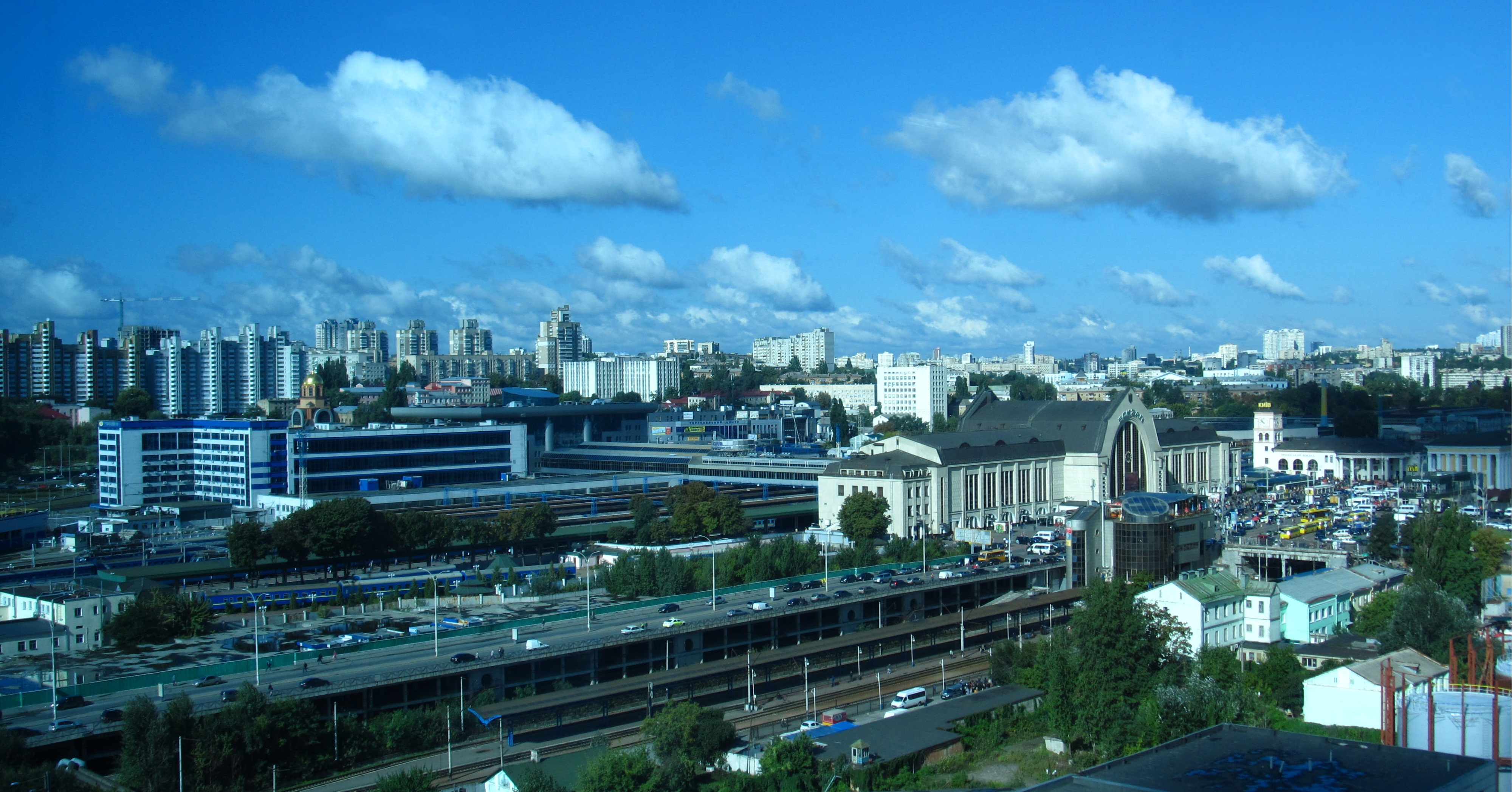 Комплекс споруд центрального залізничного вокзалу в Києві